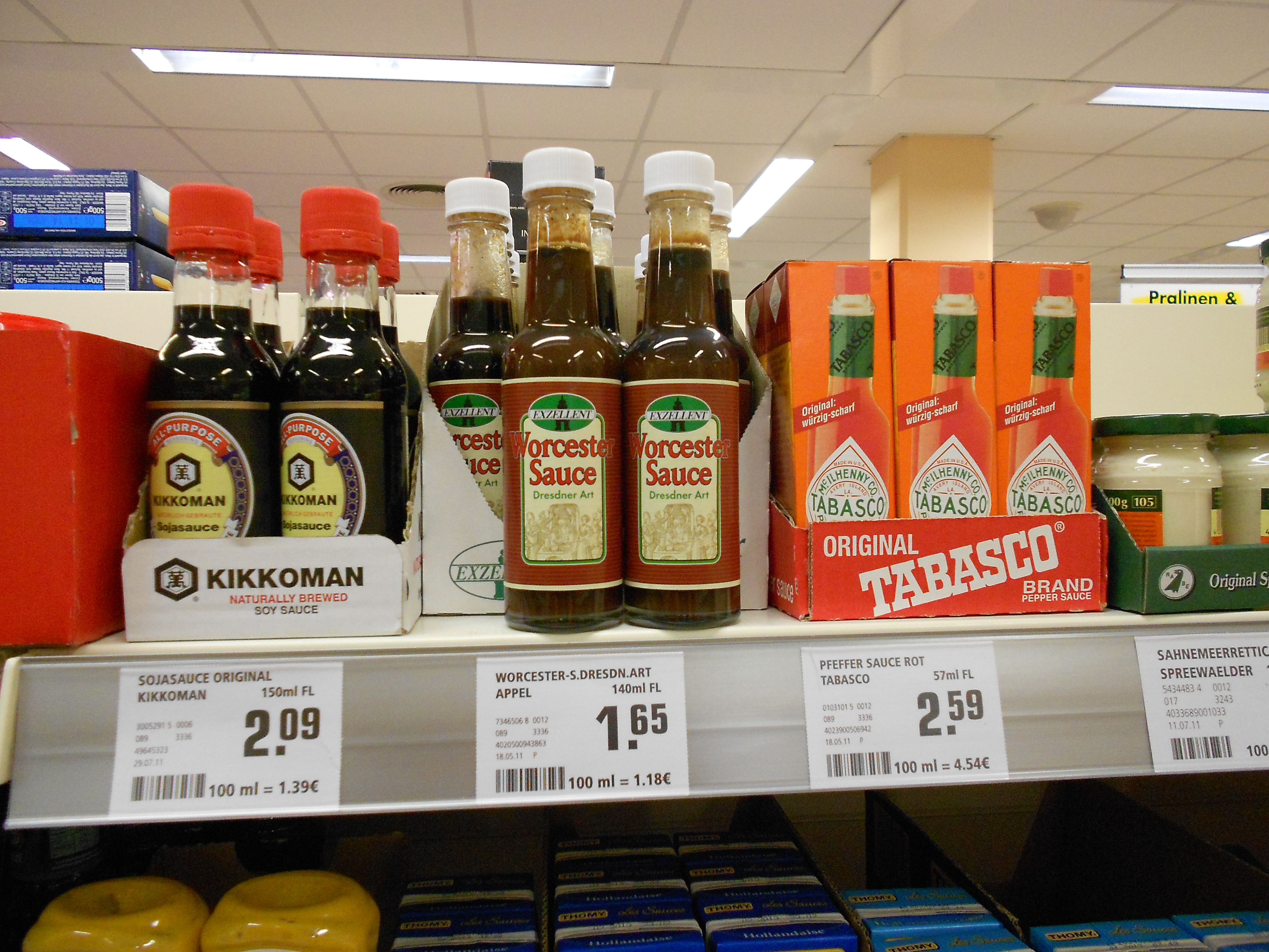 Saucen im Supermarkt